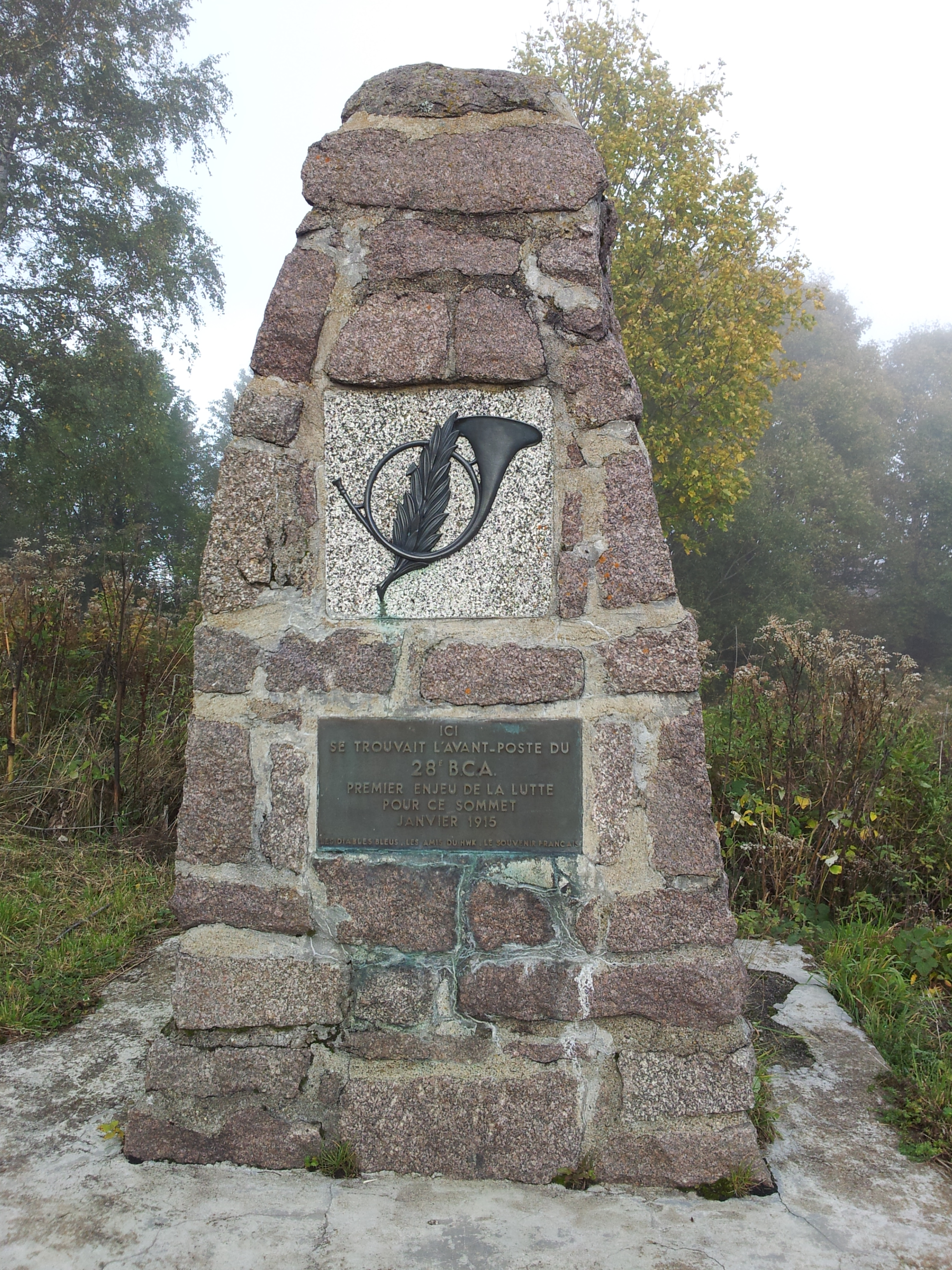 Photo prise par moi sur place